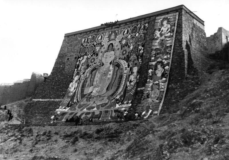 Gyantsekloster, die große Gebetsmauer im Kloster beim Tempelfest mit Tangka